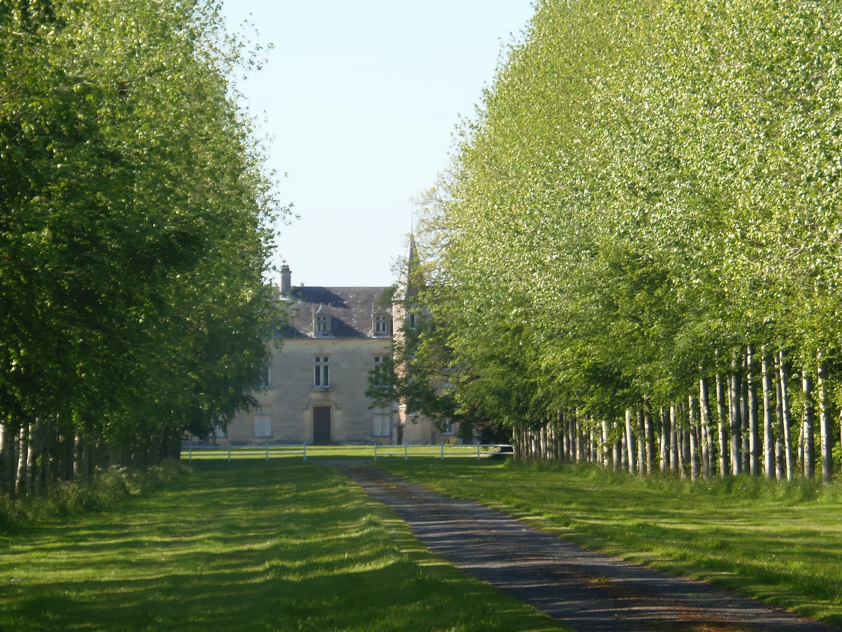 Saint-Jean-de-Savigny (Normandie, France). Le château de Rochefort.